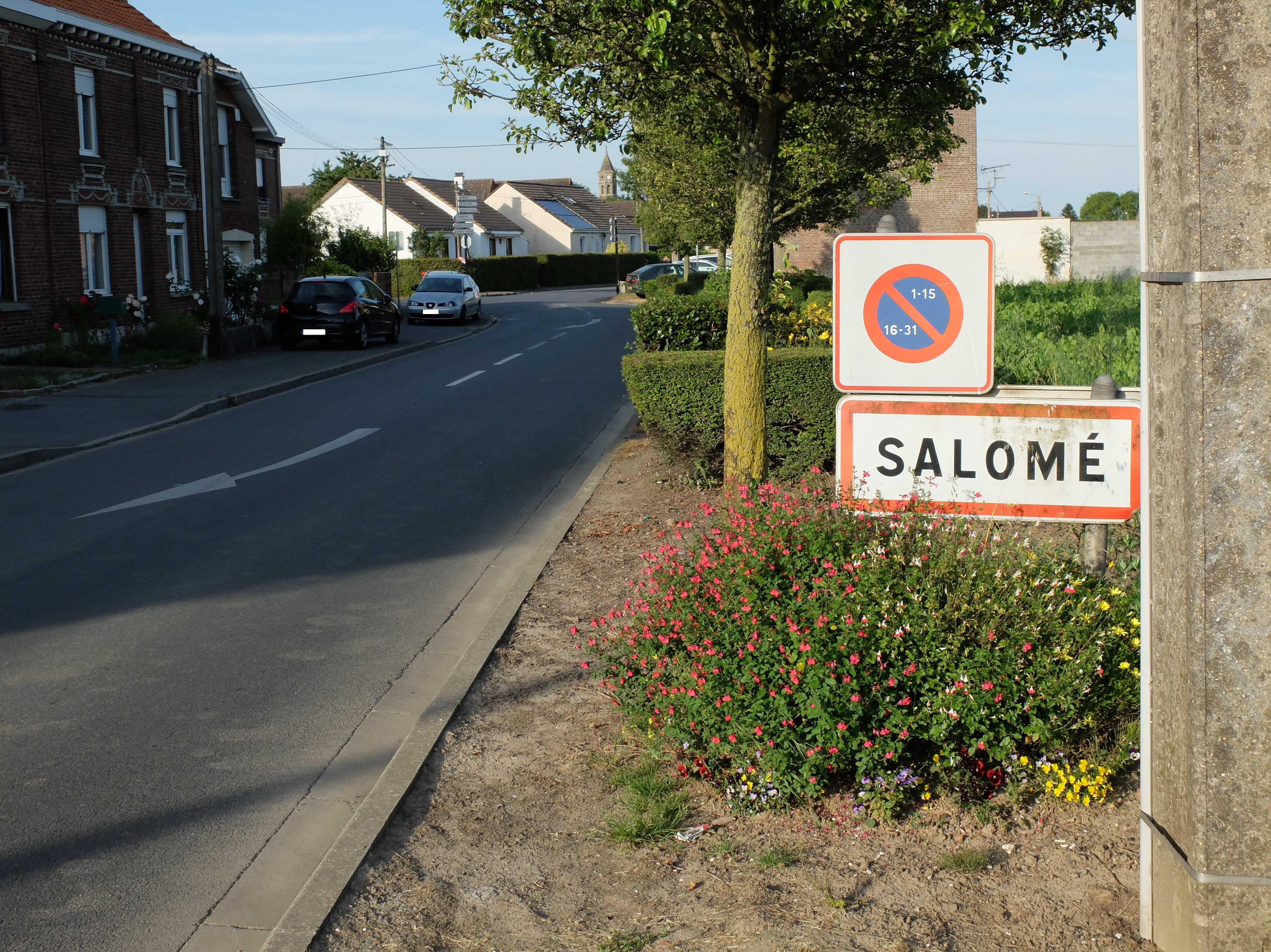 Vue d'une entrée de la commune de Salomé, dans le Nord.